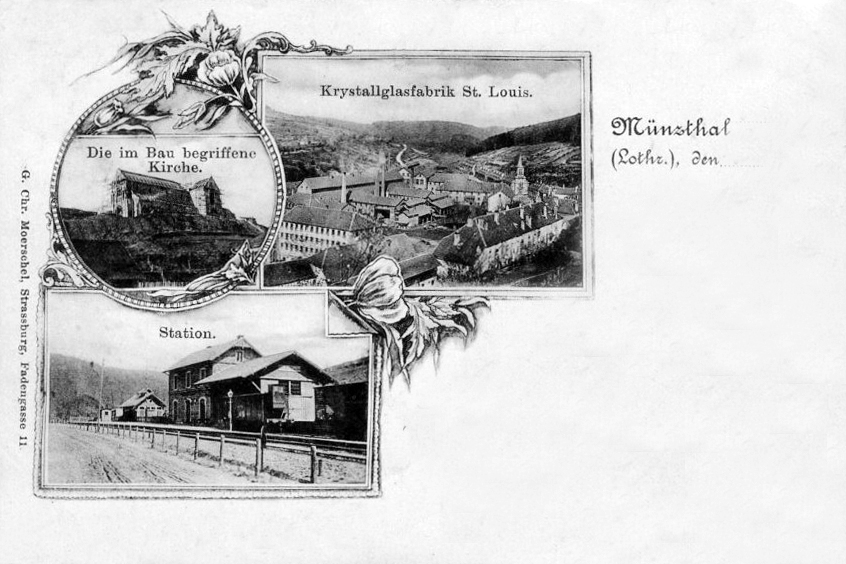 Carte postale de Münsthal (Saint-Louis-lès-Bitche), avec vues de la gare, de la verrerie et du bourg.